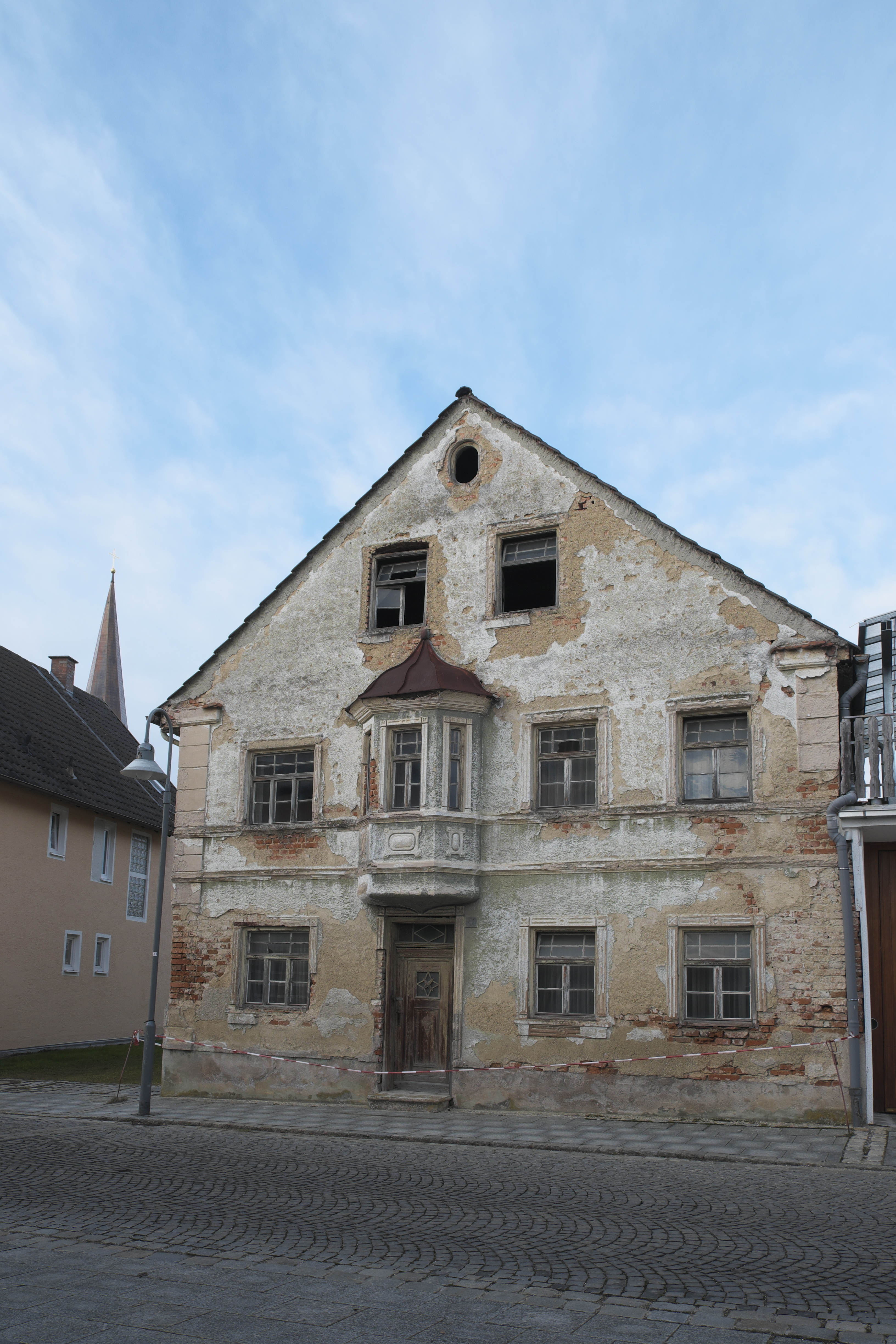 Bürgerhaus, Marktplatz 10, in Hohenwart im oberbayerischen Landkreis Pfaffenhofen an der Ilm (Bayern/Deutschland)